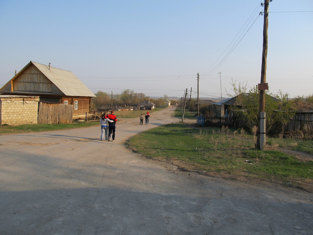 Улица села Кидыш